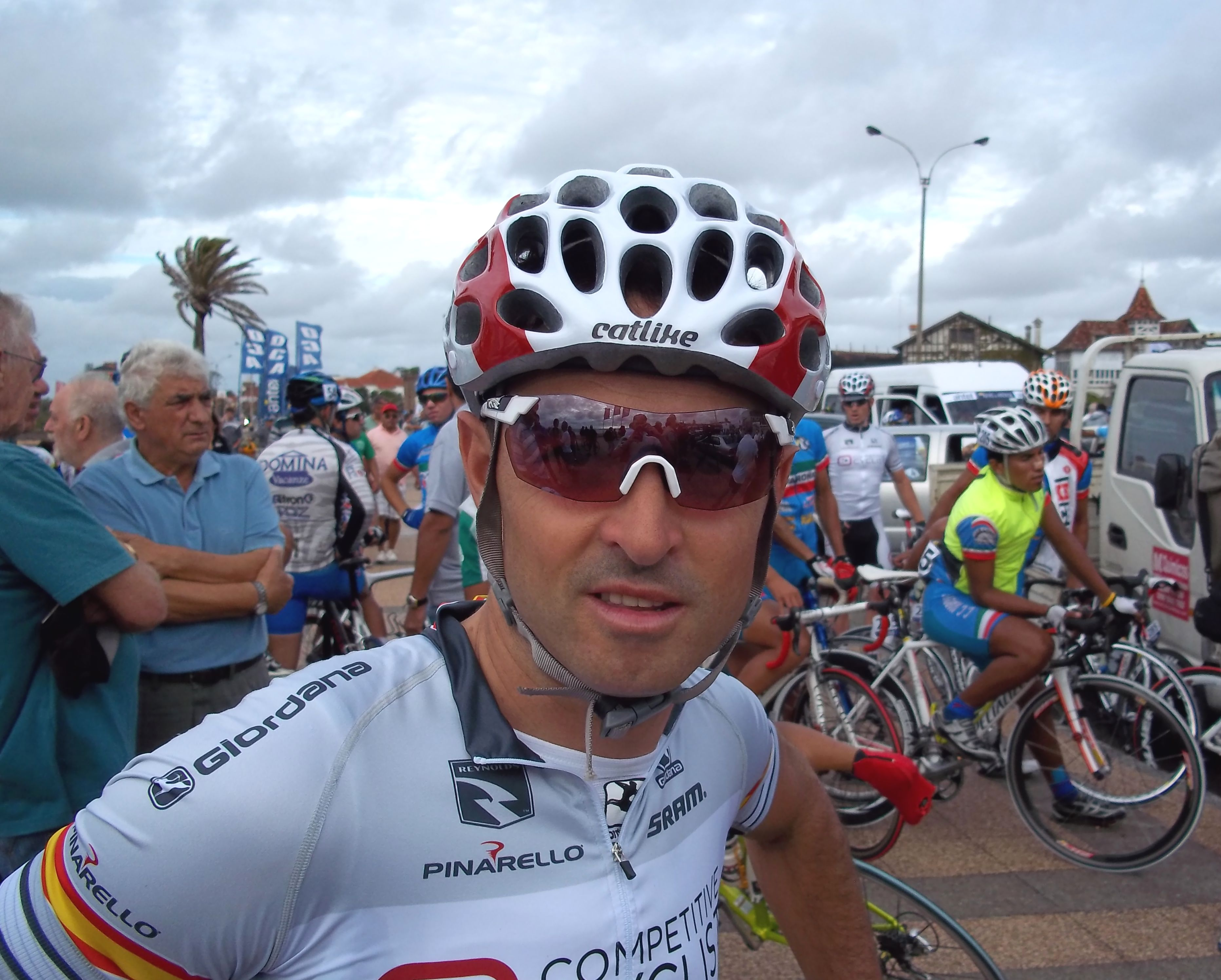 Inicio de Rutas de América 2012. Francisco Mancebo antes de la largada